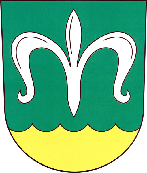 Znak obce Nesvačilka